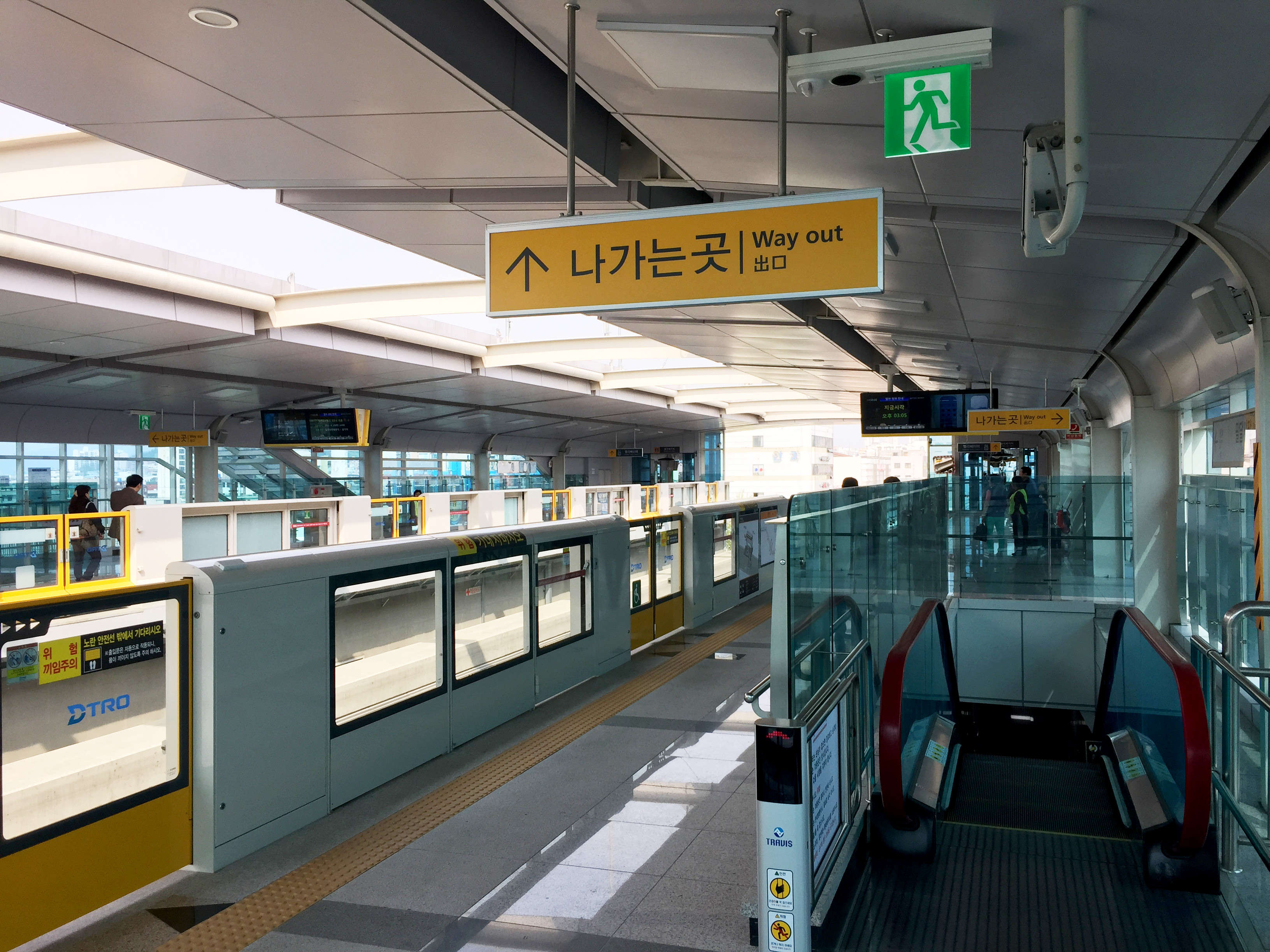 팔달시장역 승강장